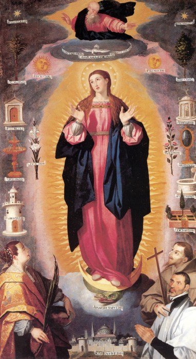 Inmaculada con San Francisco, Santa Águeda y donante.title QS:P1476,es:"Inmaculada con San Francisco, Santa Águeda y donante."